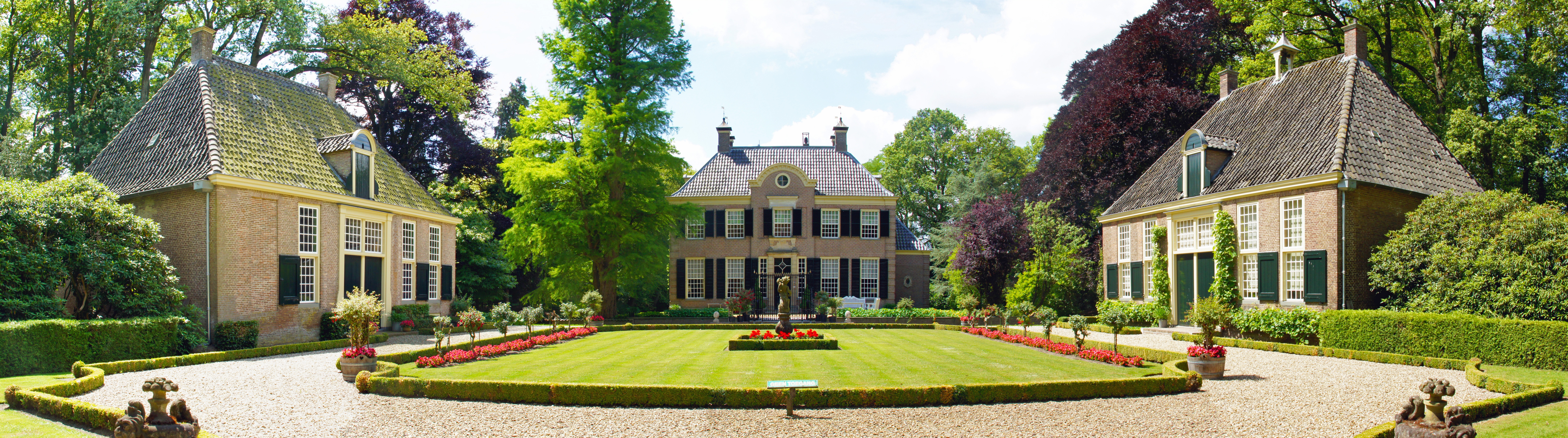 Panorama van het landhuis Den Aalhorst nabij de plaats Dalfsen in de Nederlandse provincie Overijssel.